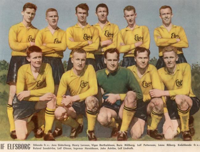 Svenska mästarna IF Elfsborg 1961.